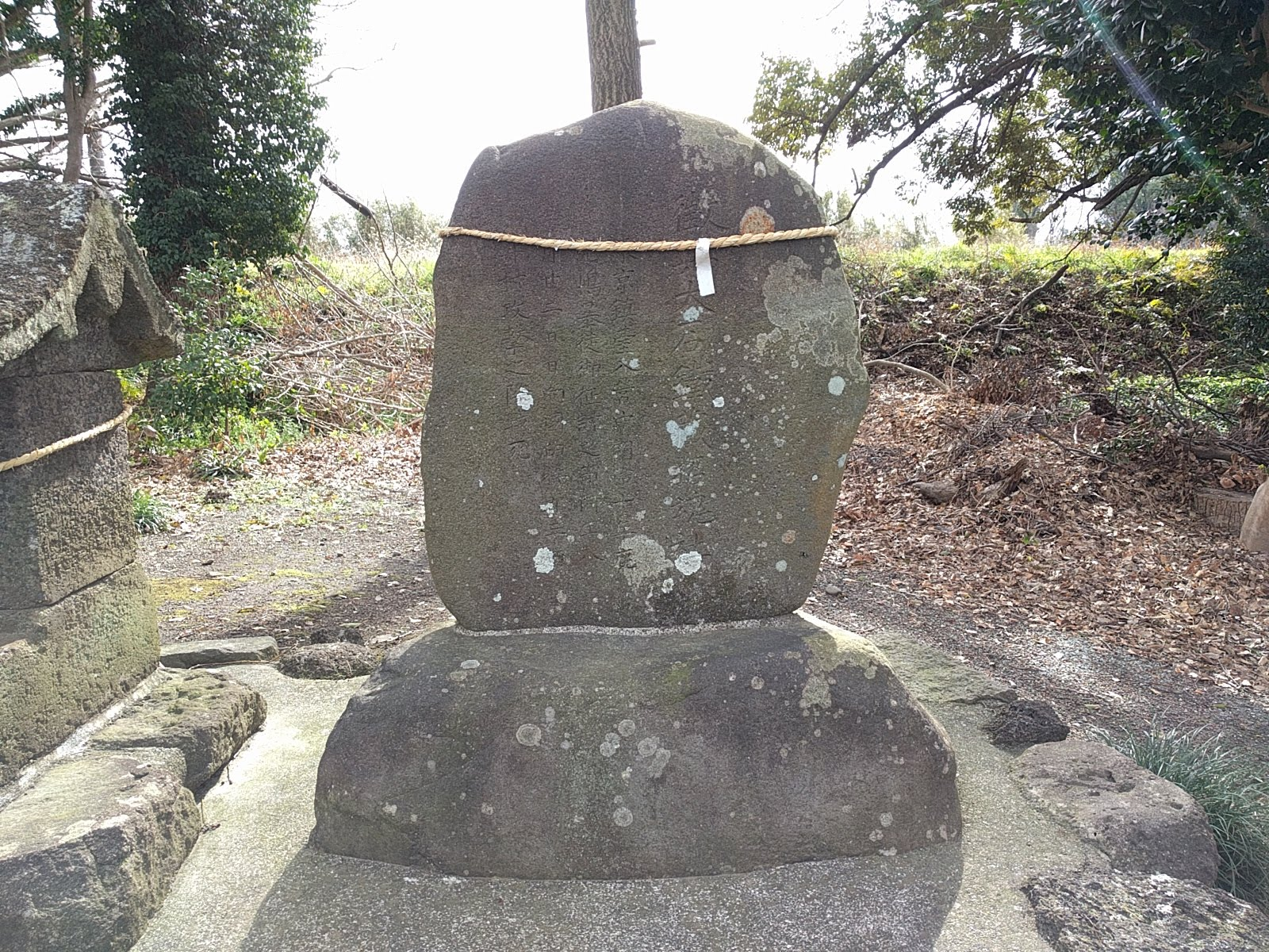 裾野市佐野原神社にある大石鉄蔵の顕彰碑